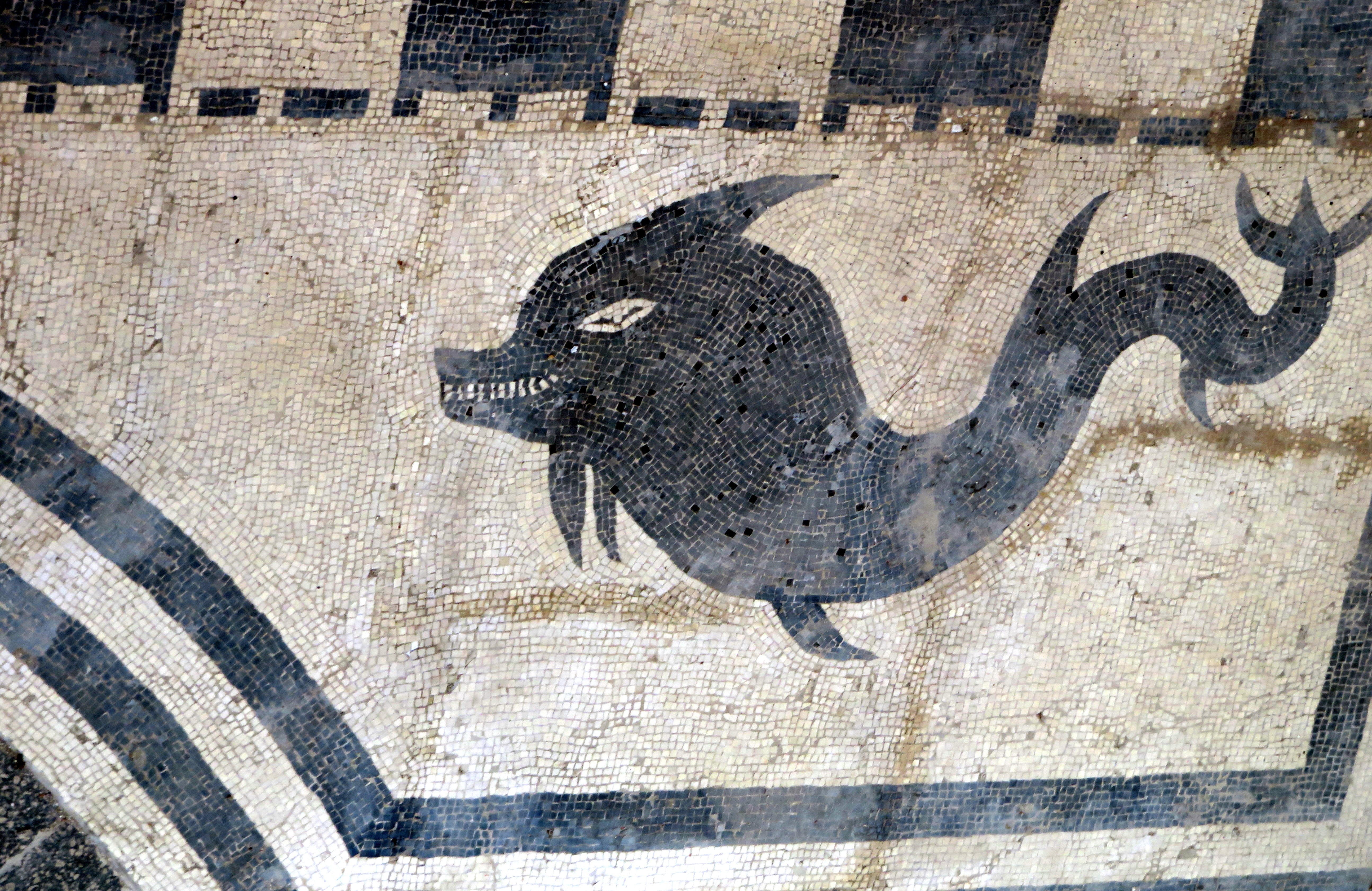 Anfiteatro romano di Ancona - delfino nel mosaico dell'area archeologica